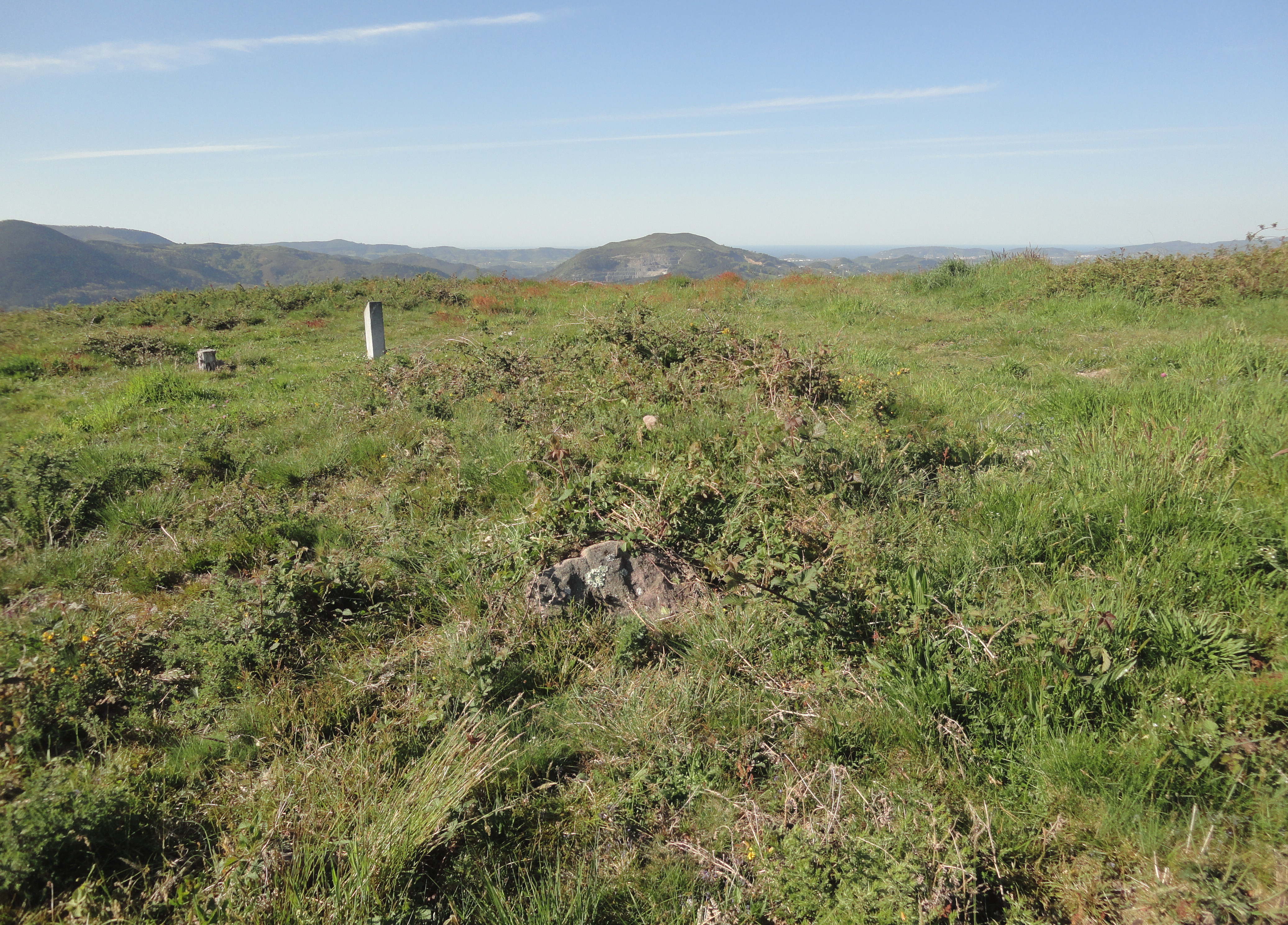 Oindolar III trikuharria